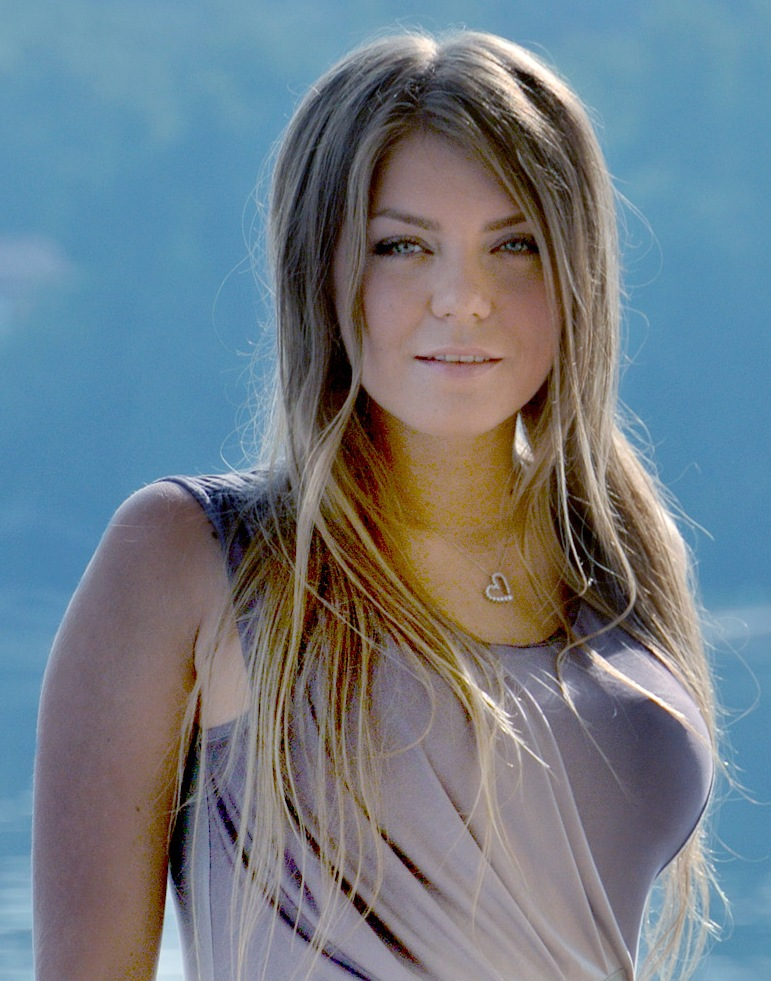 Оксана Почепа на съемках клипа "Счастье есть"